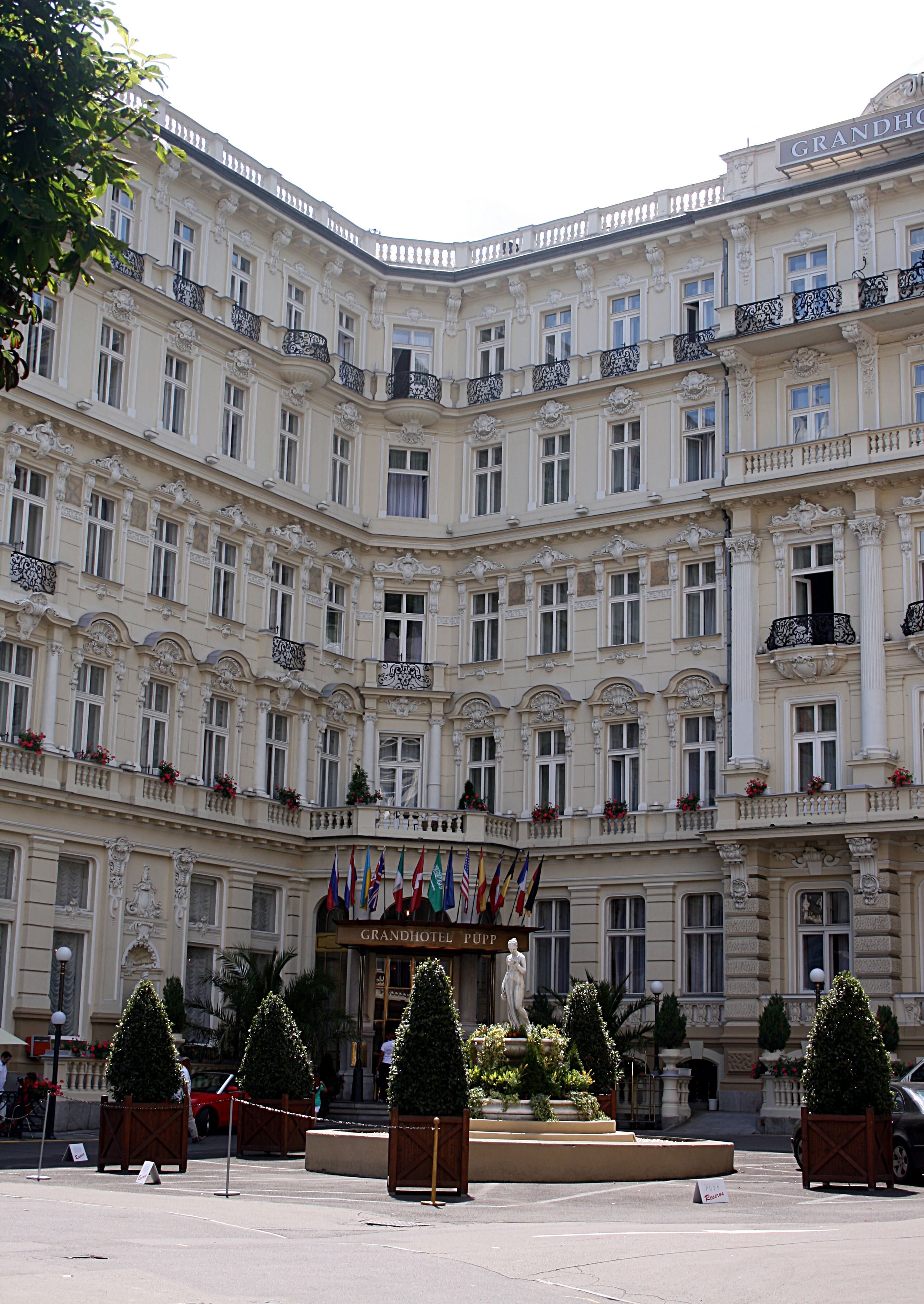 Karlsbad, Grandhotel Pupp (1760 baut Jan Jiří Pop aus Veltrus in Karlsbad)